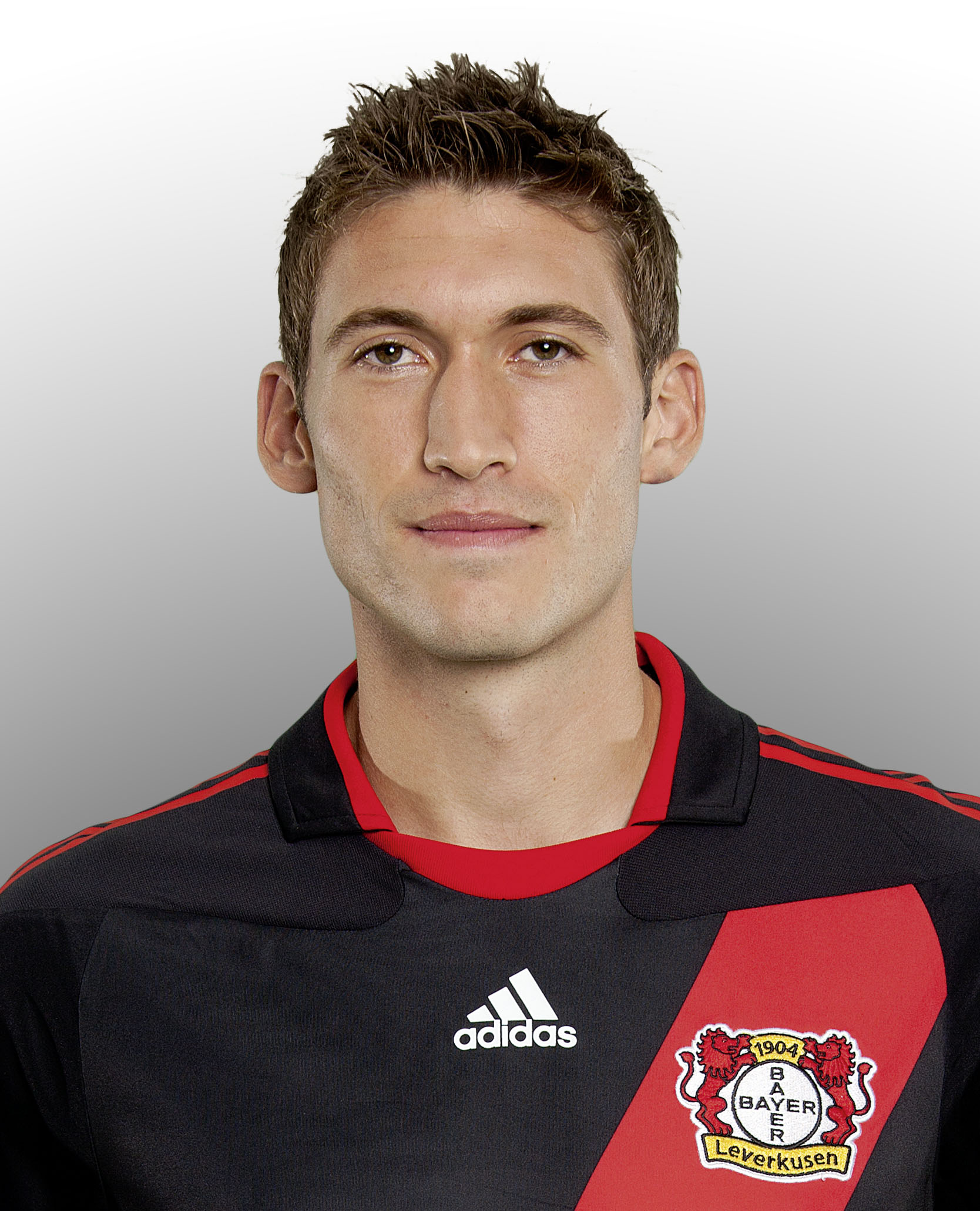 Stefan Reinartz, Fußballspieler